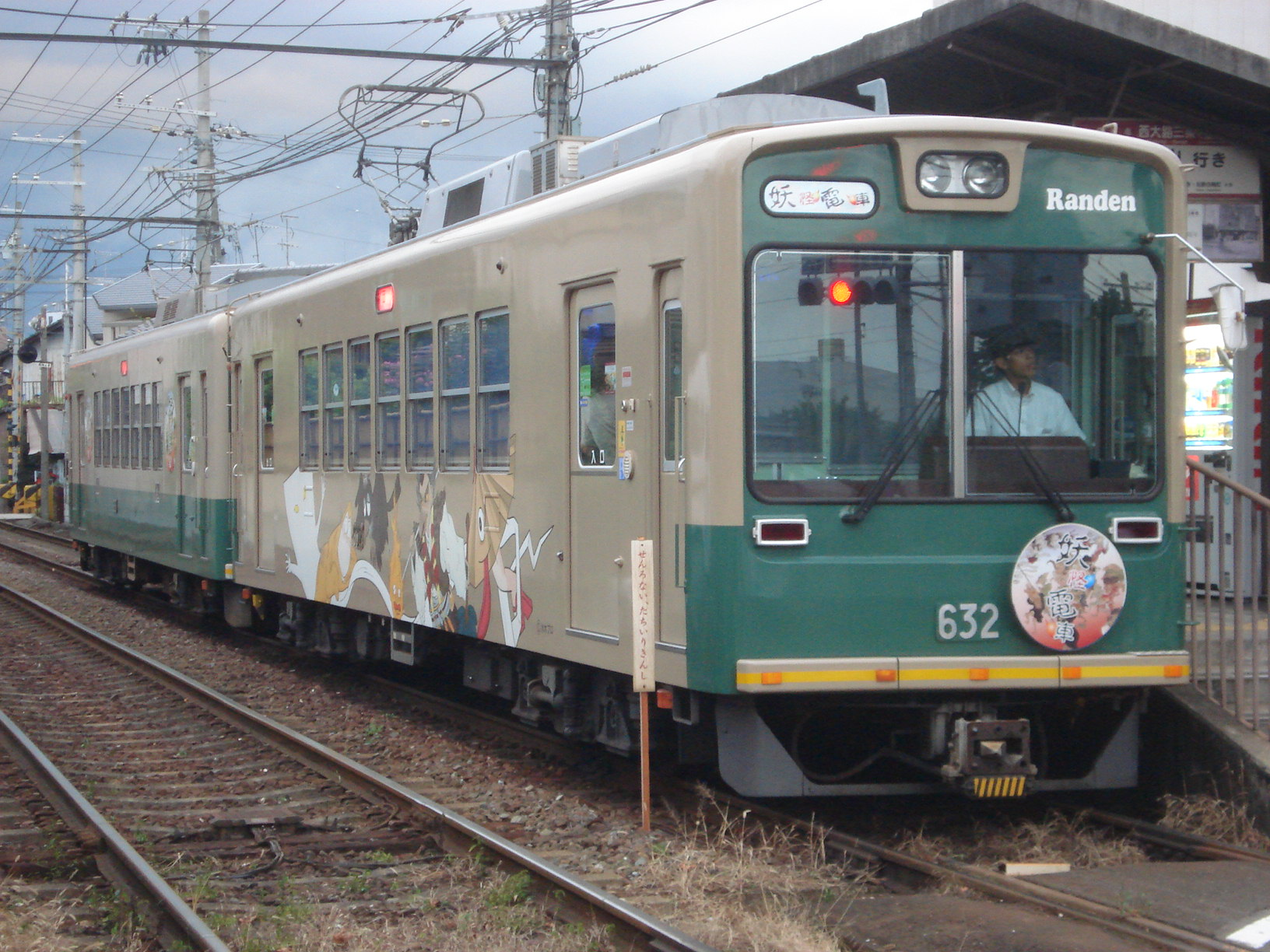 2011年8月に運転された「妖怪電車」 2011年8月26日、西大路三条駅にて撮影